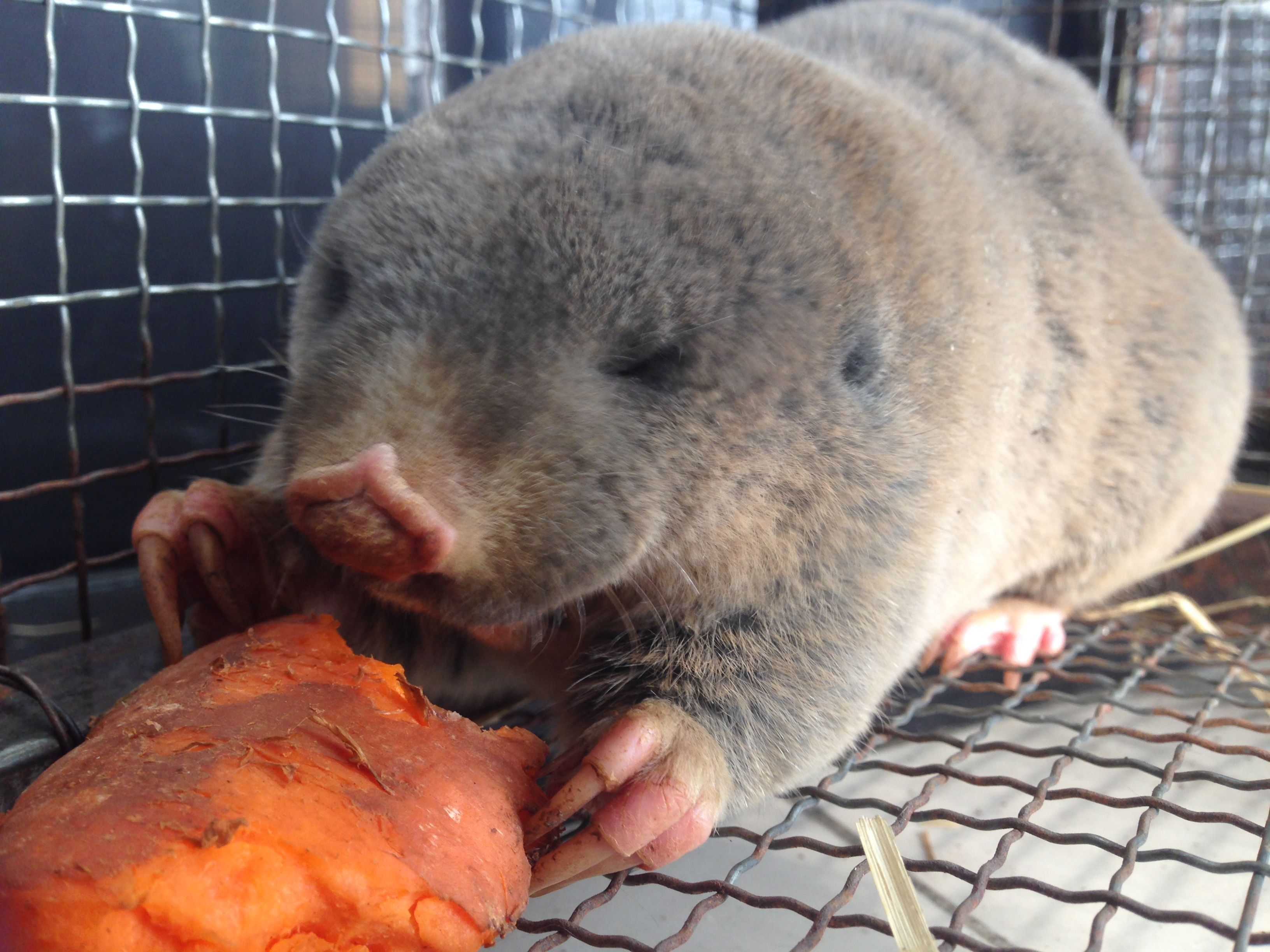 中文（中国大陆）: 高原鼢鼠 采食